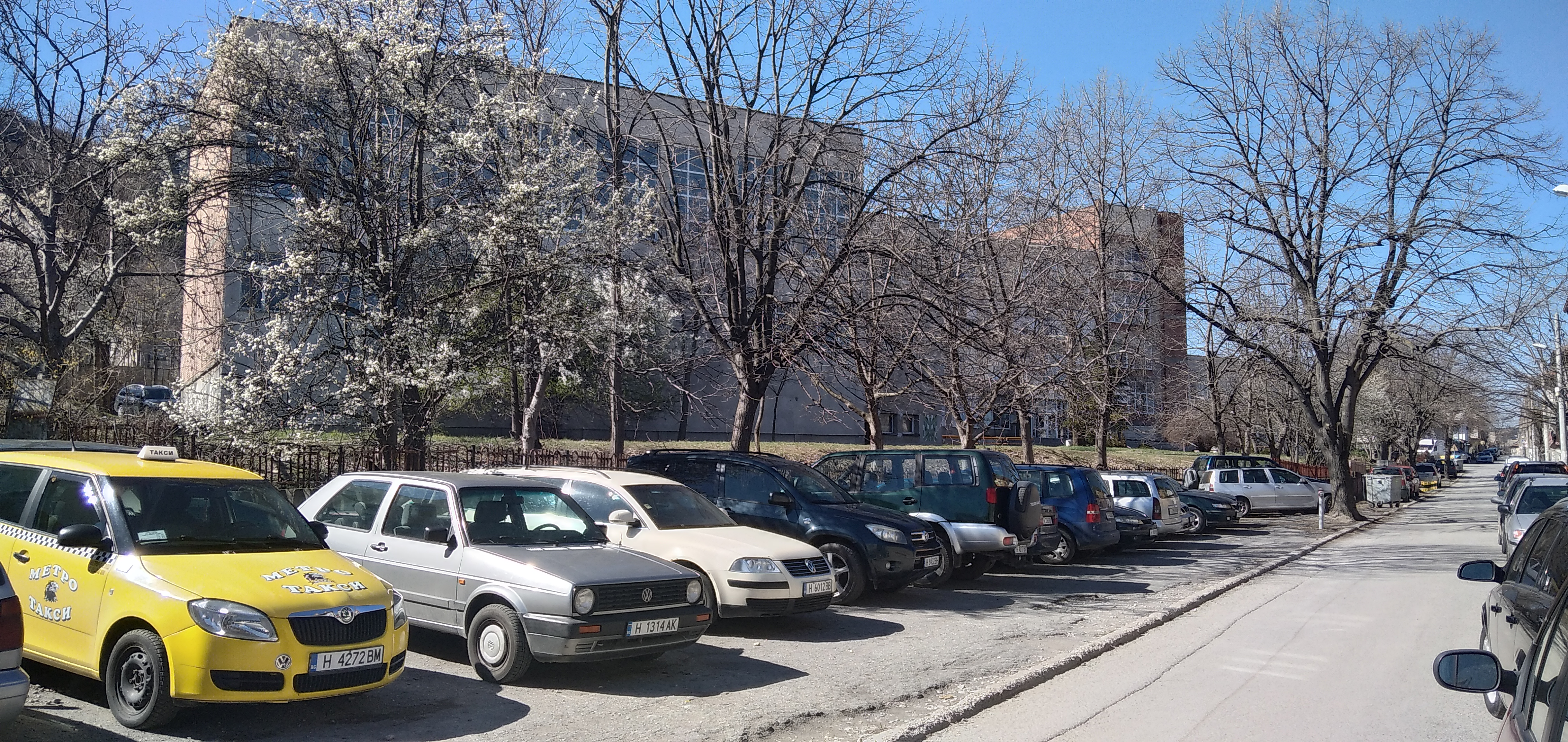 Сградата на 2-ри корпус на Шуменския университет, където се помещава Педагогическият факултет.